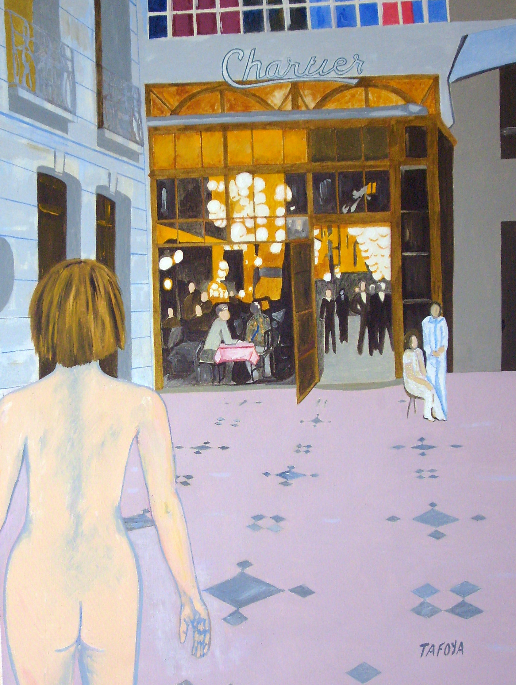 acrilico sobre lino del restaurante parisino Chartier